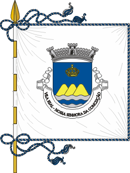 Estandarte da freguesia de Nossa Senhora da Conceição (concelho de Vila Real)